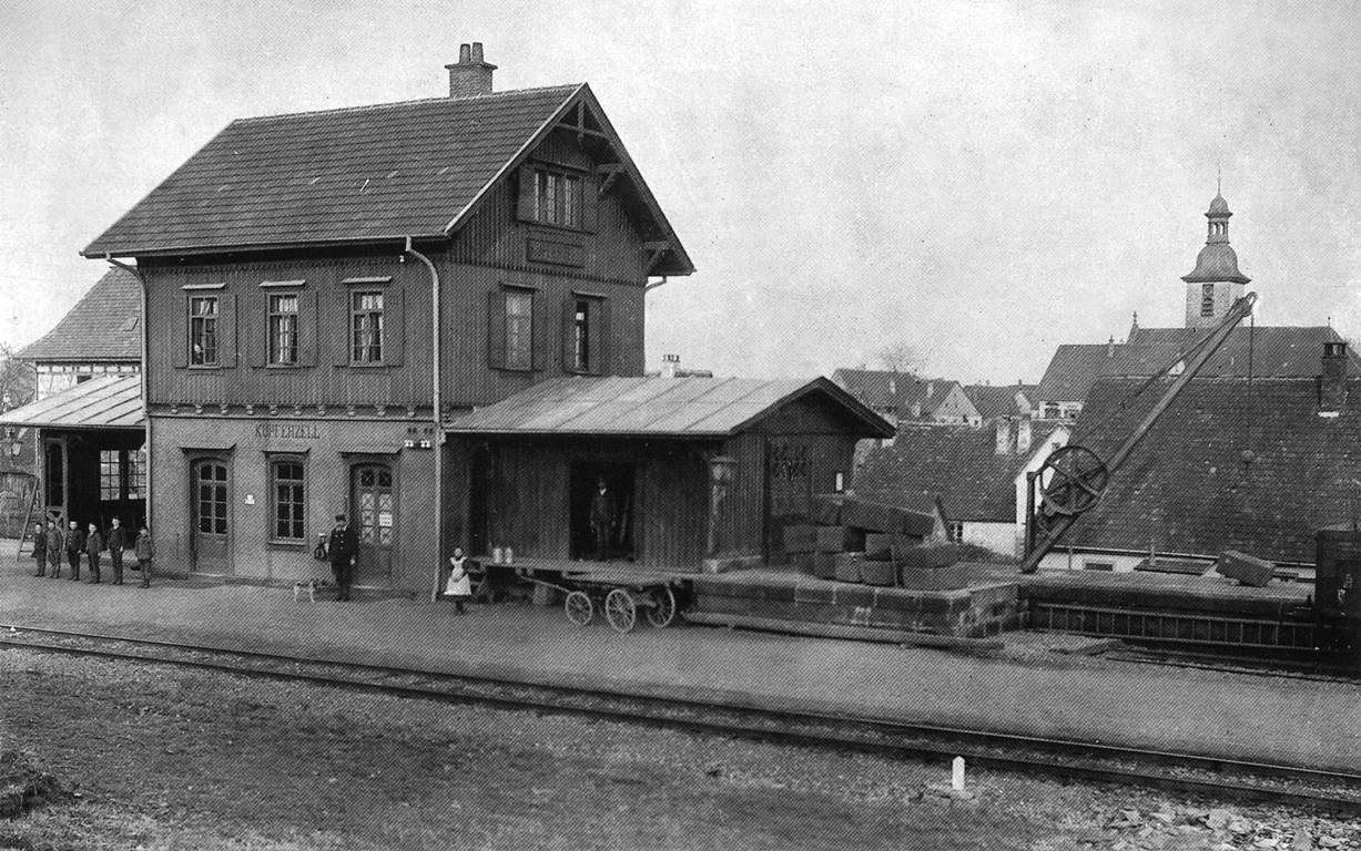 Bahnhof Kupferzell